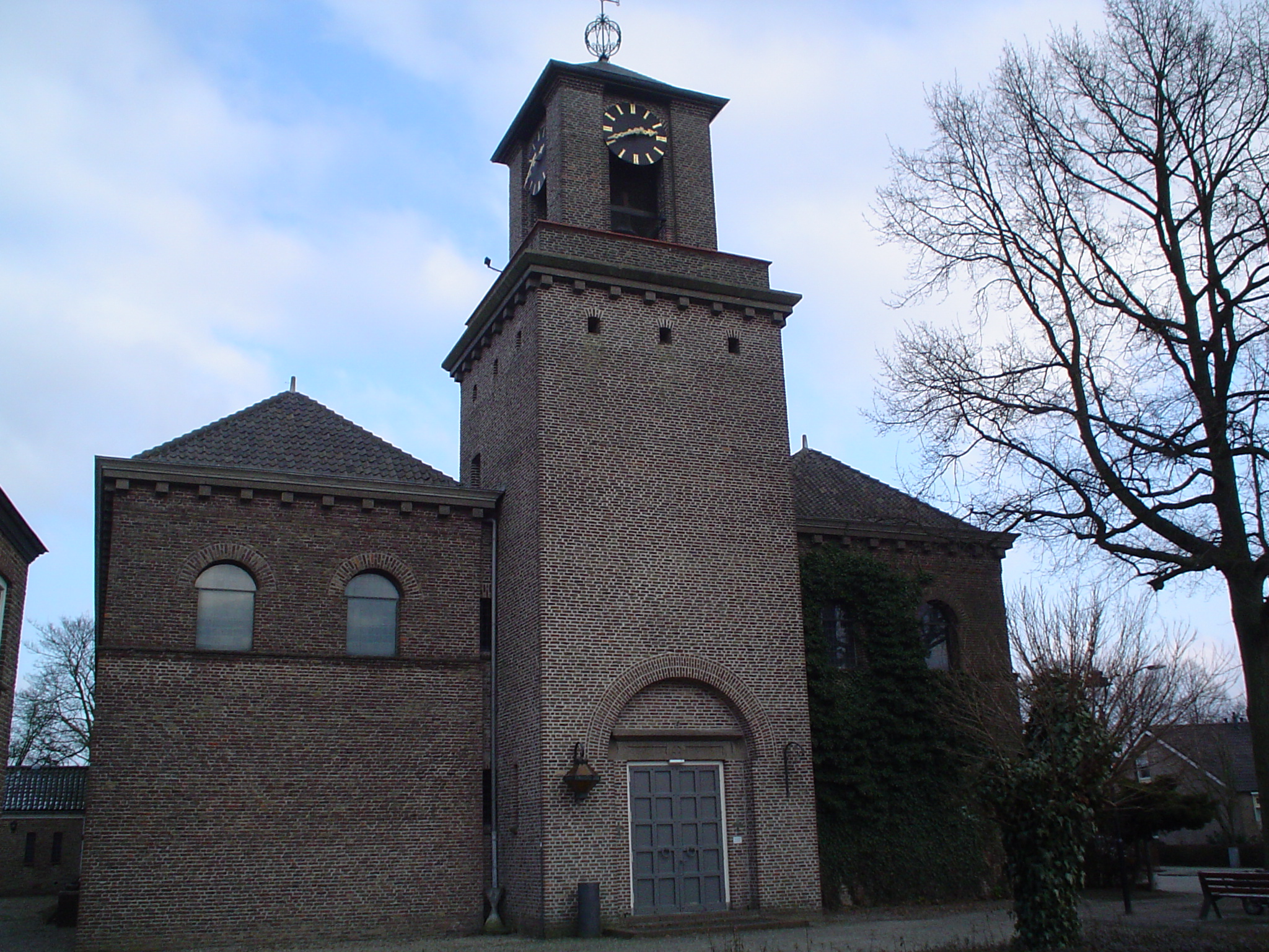 Sint-Bavokerk - Angeren, The Netherlands